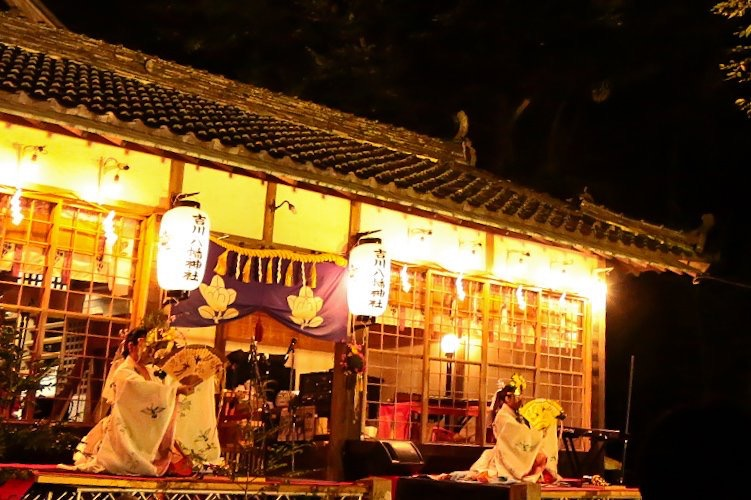 吉川八幡神社 浦安の舞